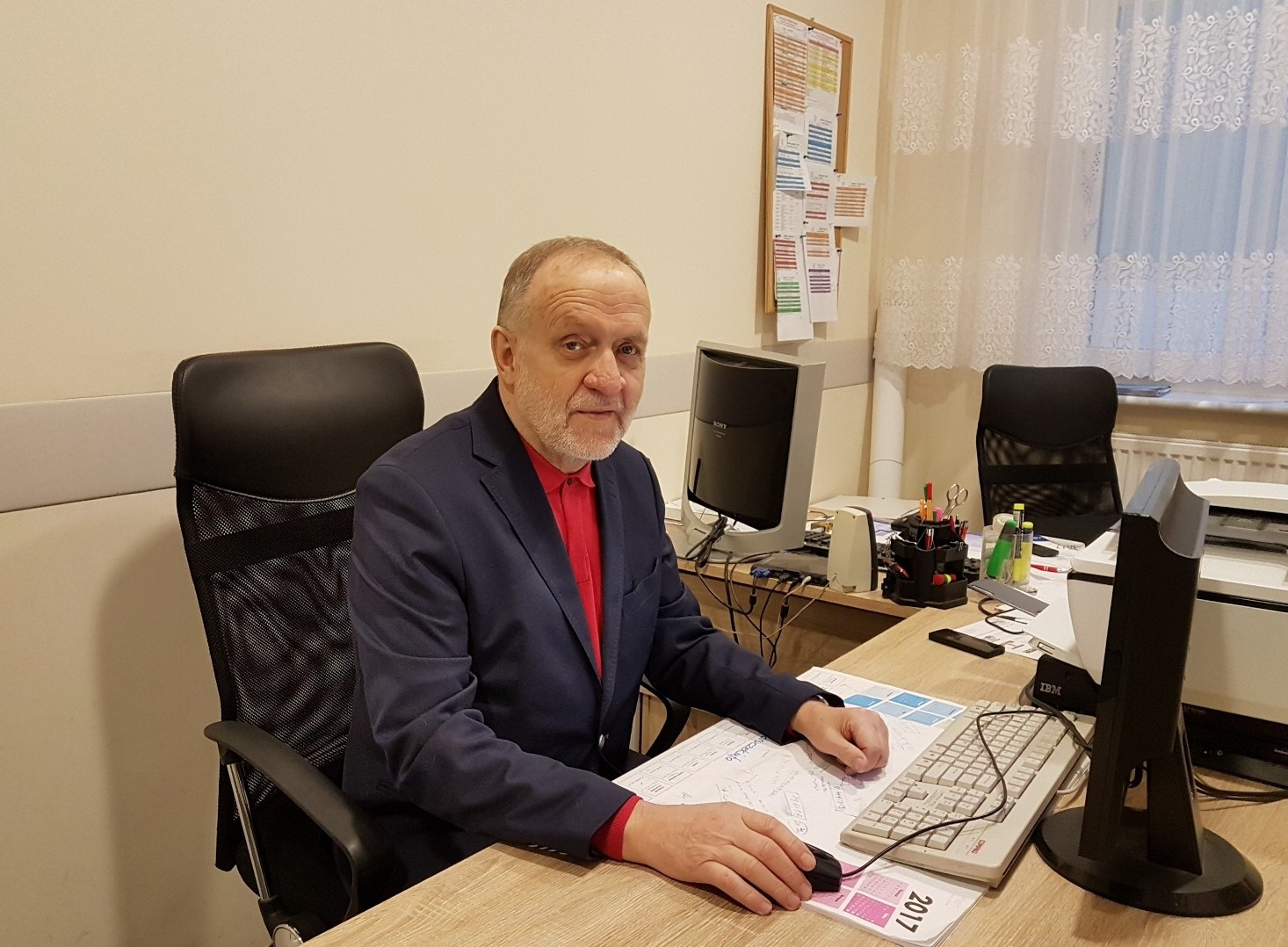 Zbigniew Hering